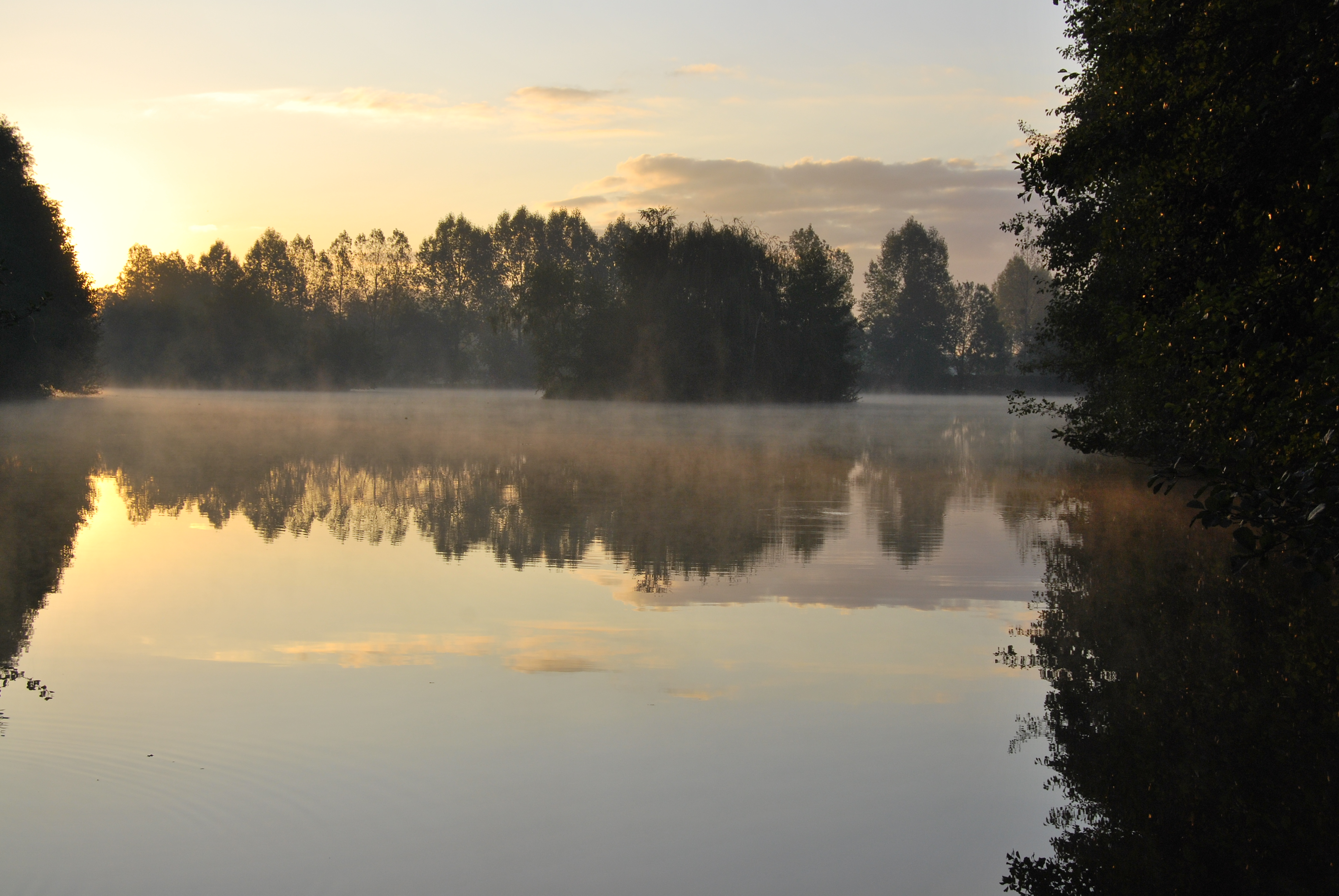 Brume sur l'étang de La Rivière de Saint-Georges-du-Bois dans le département français de la Sarthe, en octobre 2009.